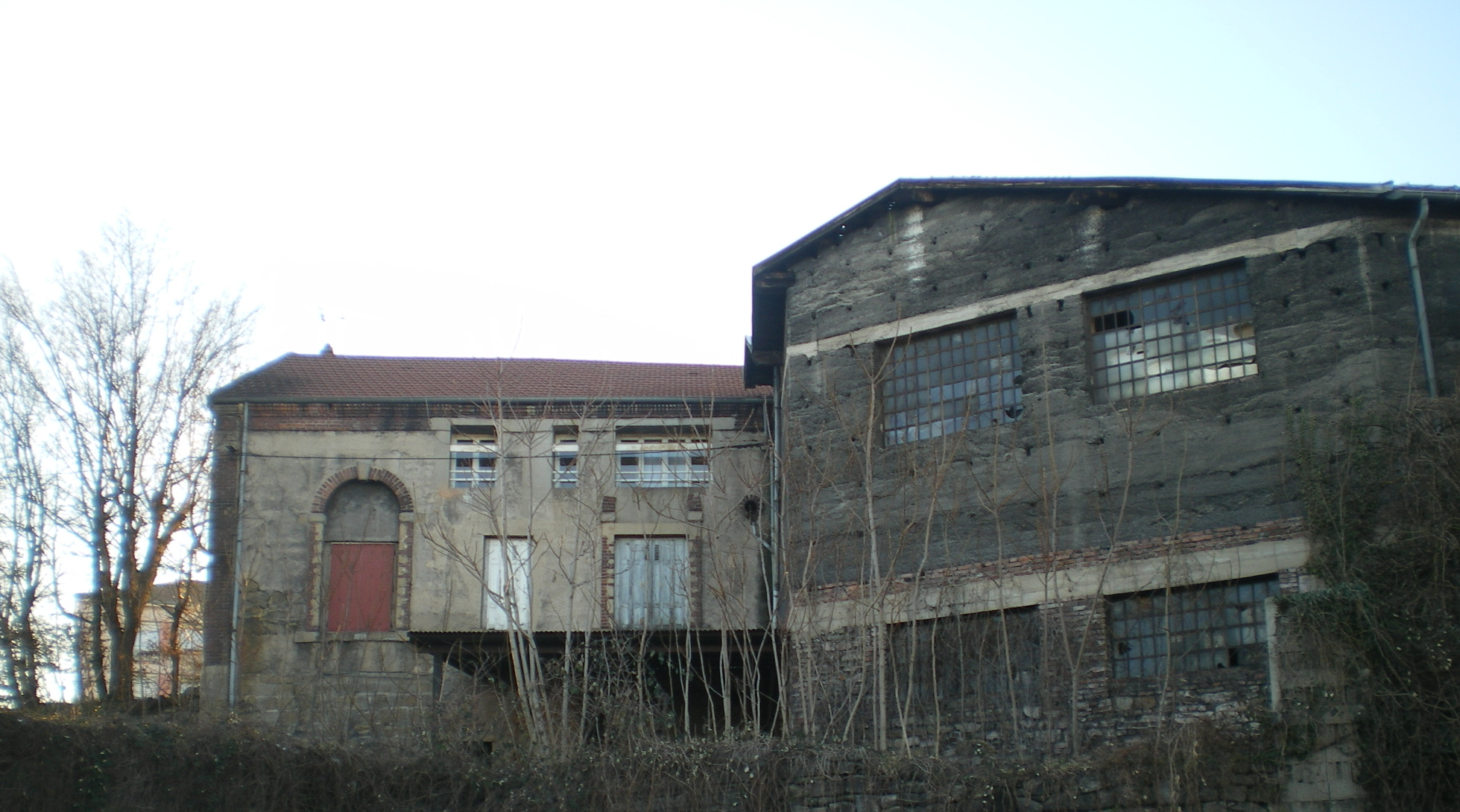 Anciens bâtiments du puits du Bardot, quartier du Soleil, Saint-Etienne (France)